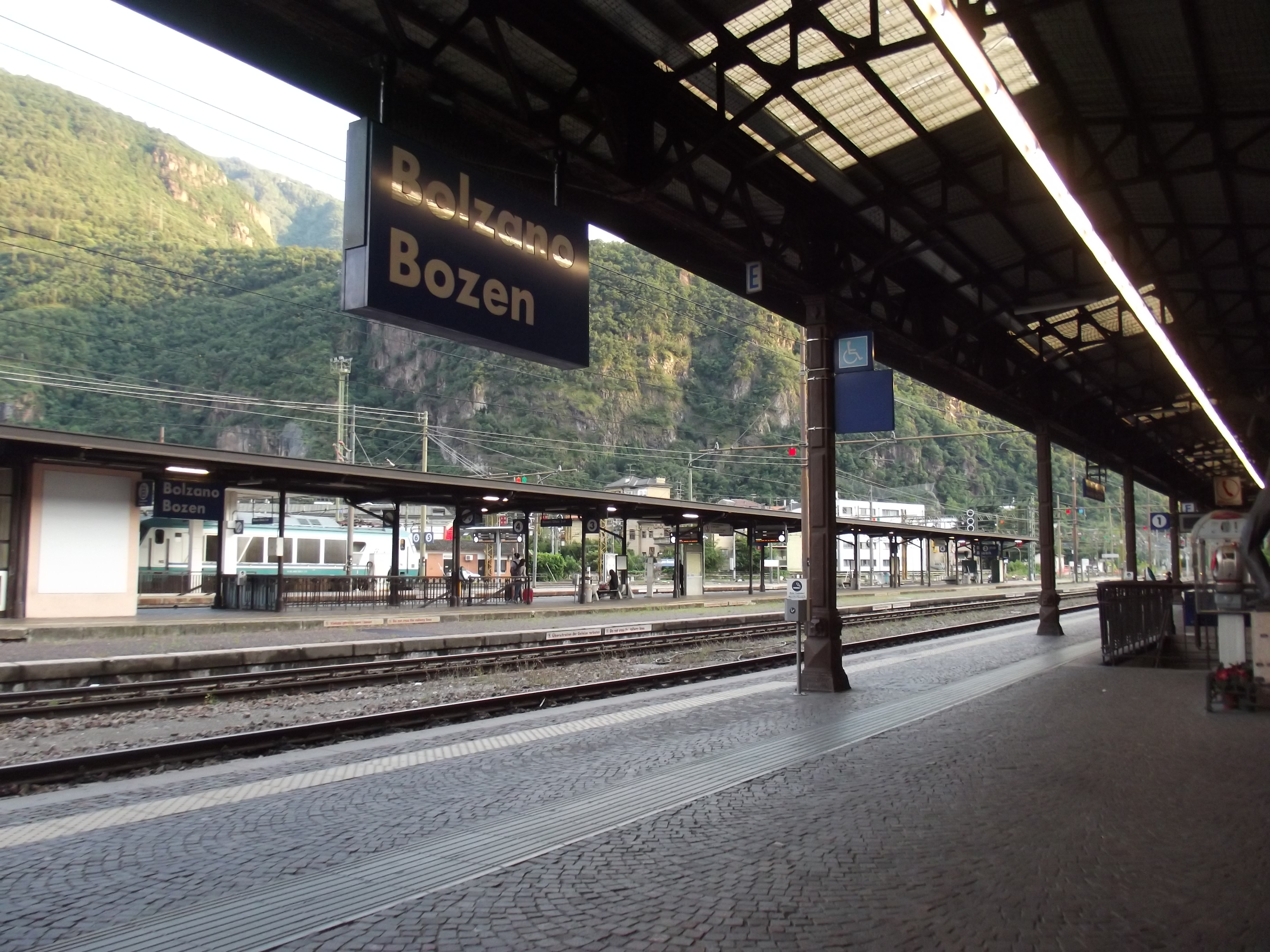 Station Bolzano in juli 2014